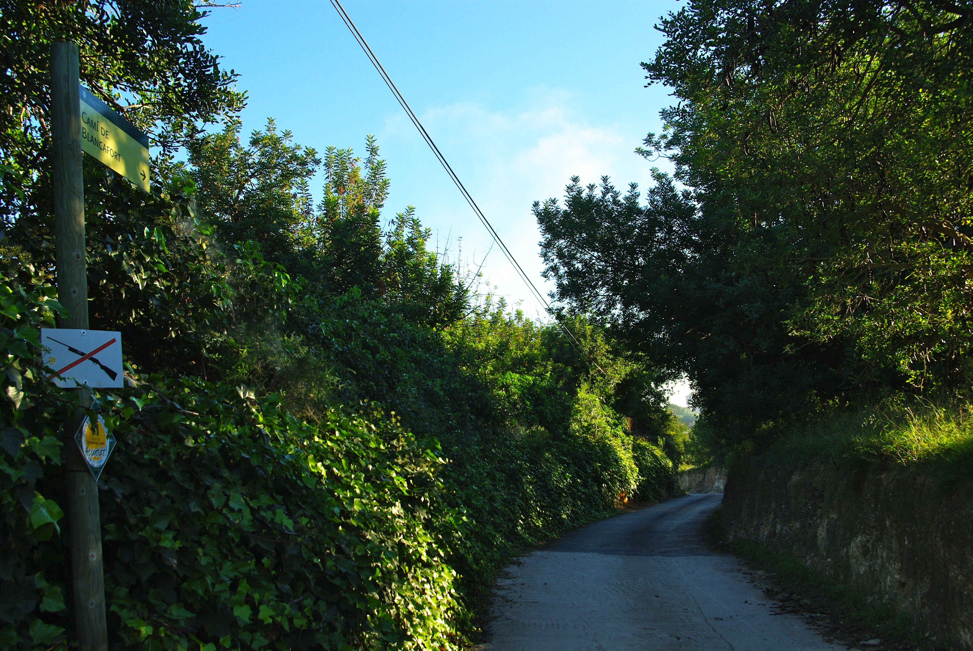 Camí de Blancafort vora el Mas del Borrassot